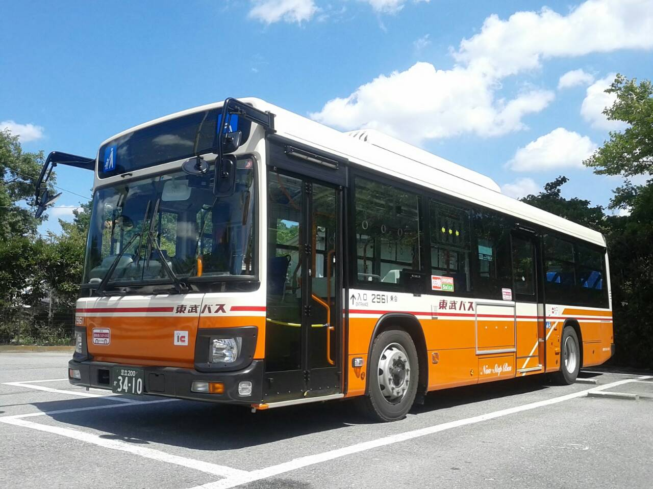 2017年度に導入されたいすゞエルガ